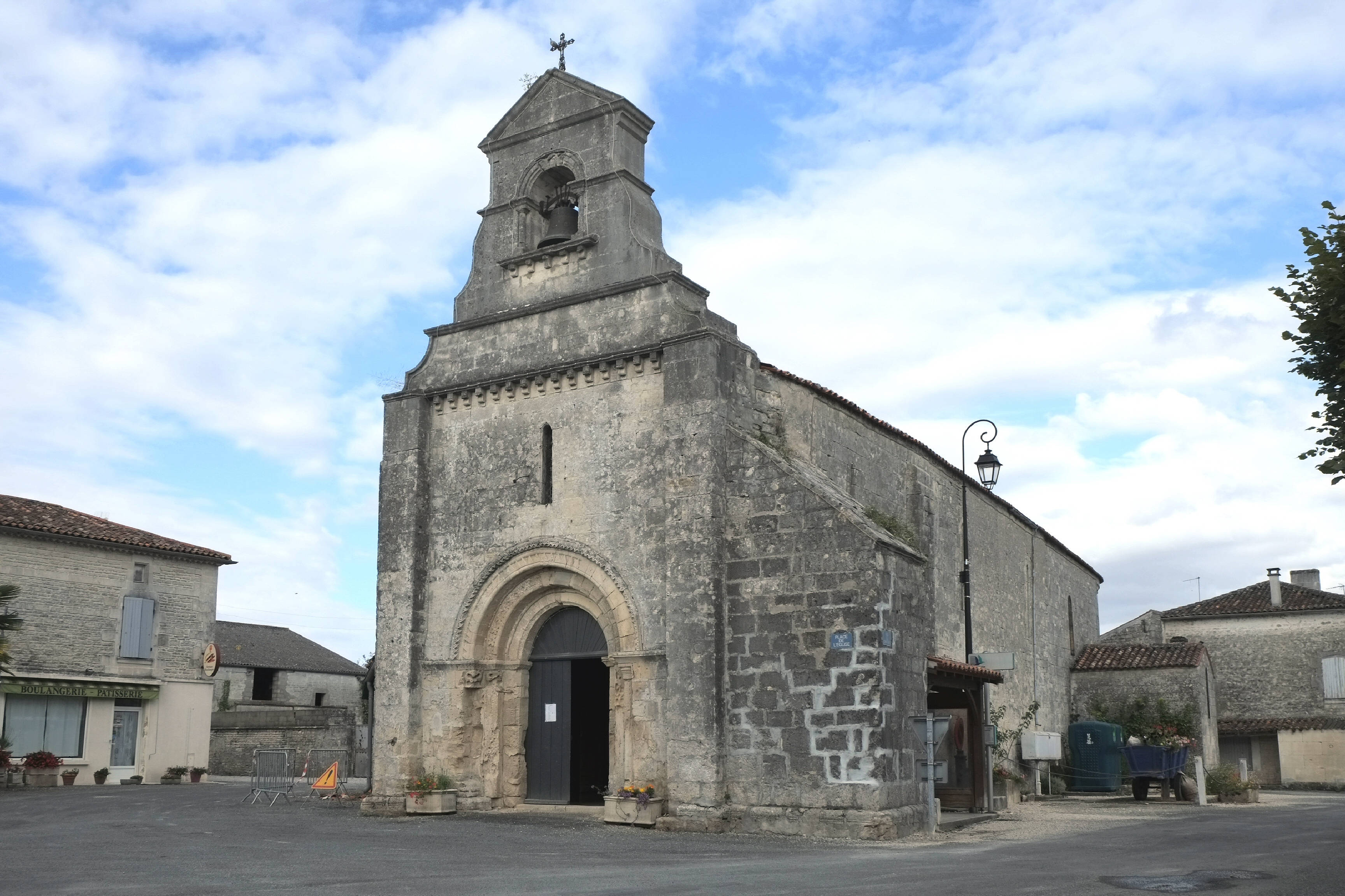 Église Sainte-Madeleine Thors Charente-Maritime France